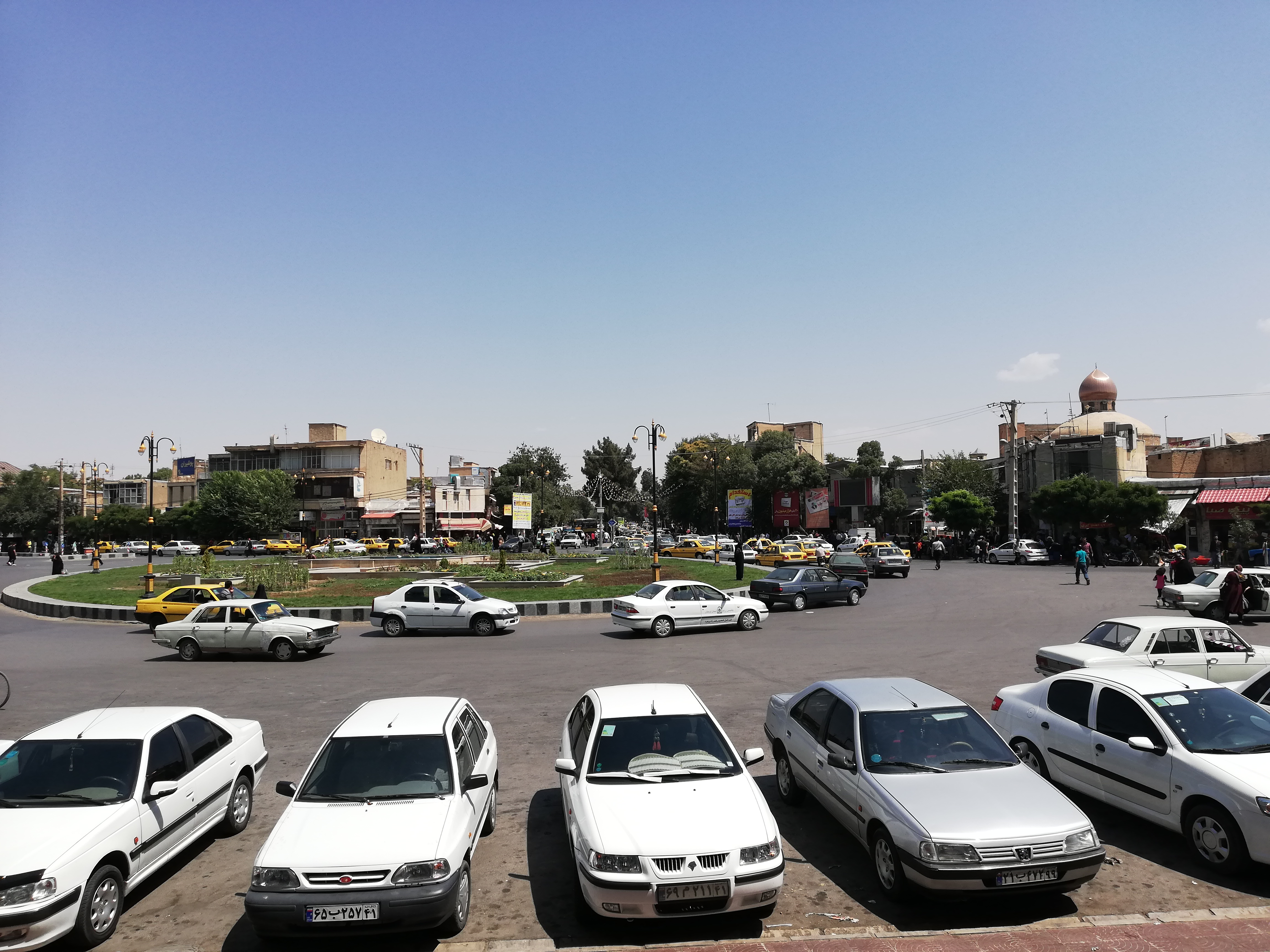 نمایی از میدان رازان و خودروهای سواری خطی در جنوب میدان